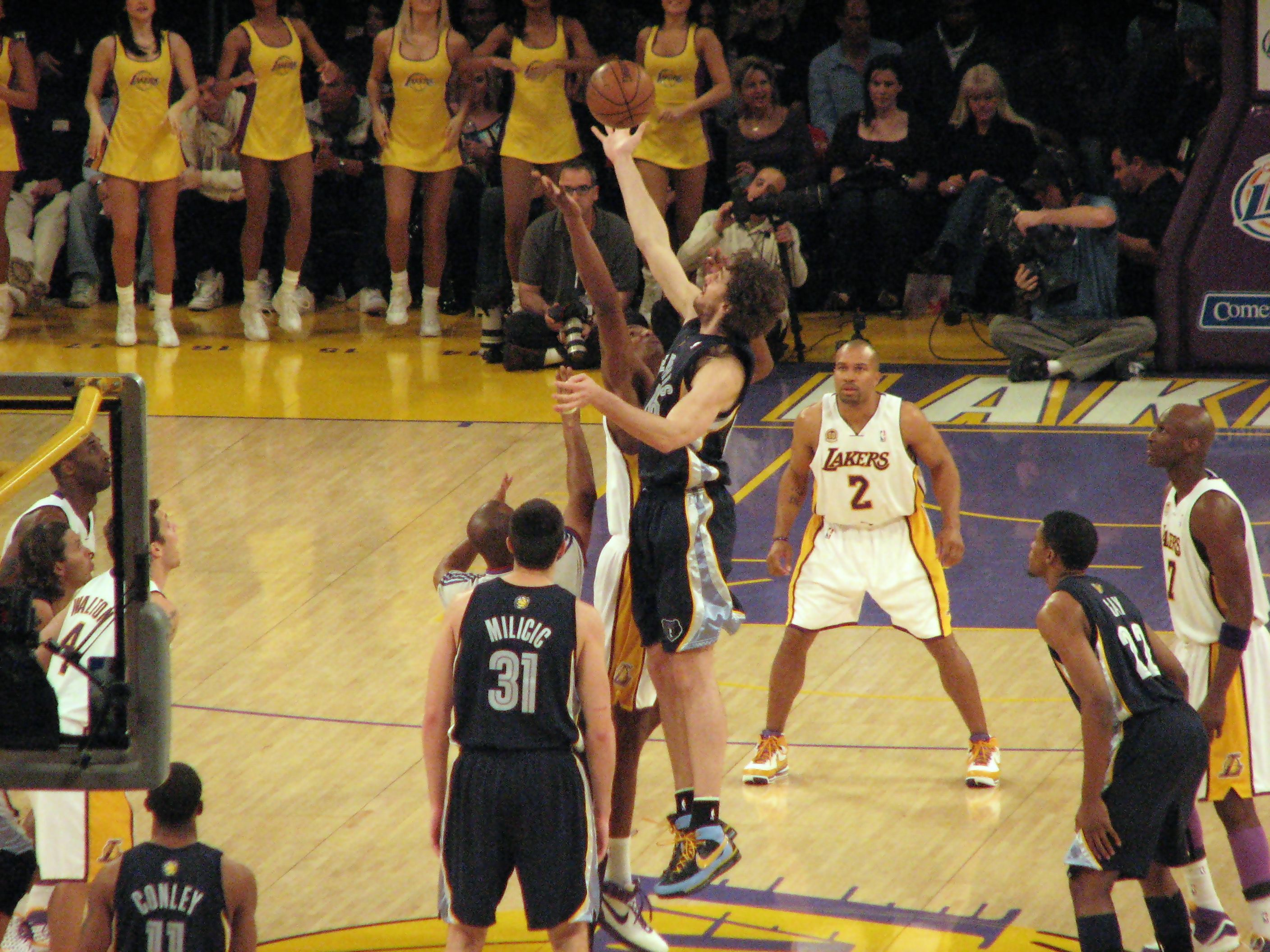 Lakers vs Grizzlies, días antes de que Gasol fichara por L.A.Lakers